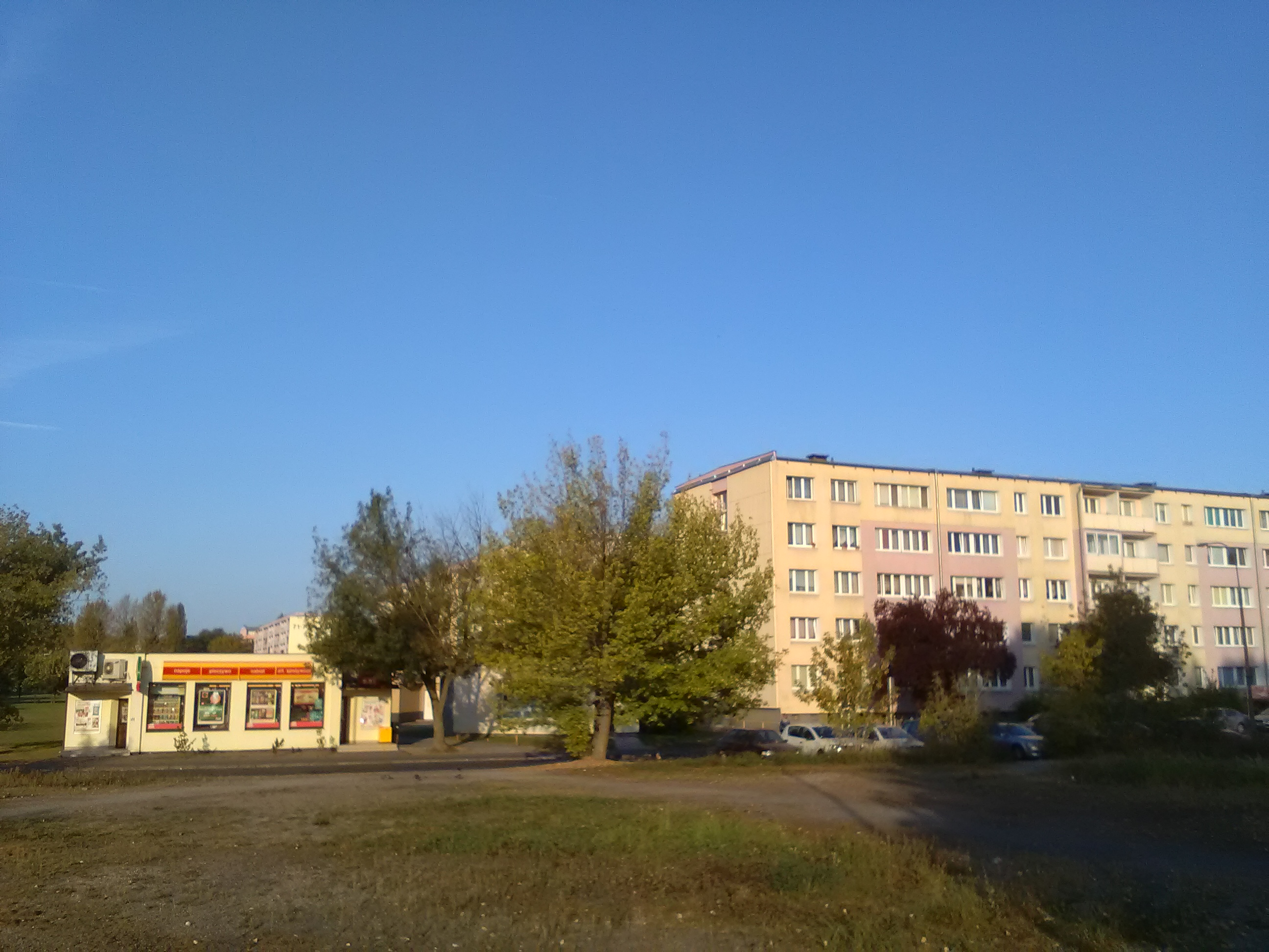 Ulica Wyzwolenia w Poznaniu. Odcinek na osiedlu Rzeczypospolitej.